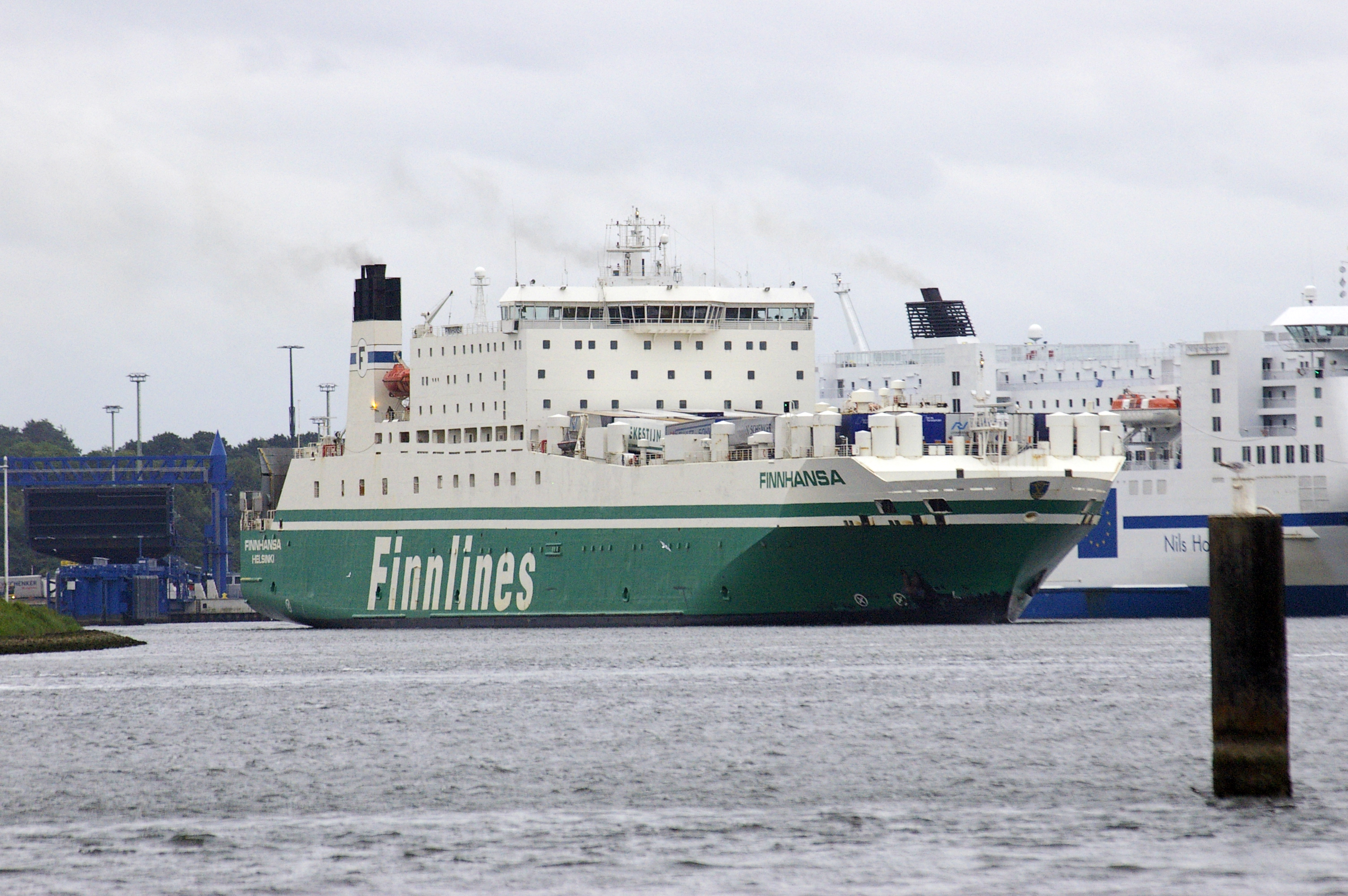 M/S Finnhansa leaving Travemünde